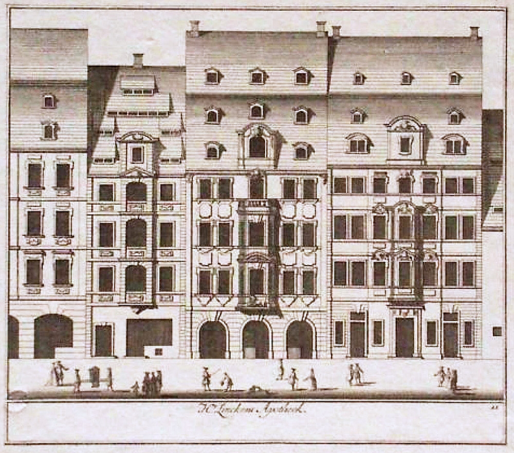 Die Leipziger Apotheke Zum goldenen Löwen des Johann Heinrich Link d.Ä. in der Gimmaischen Straße um 1710